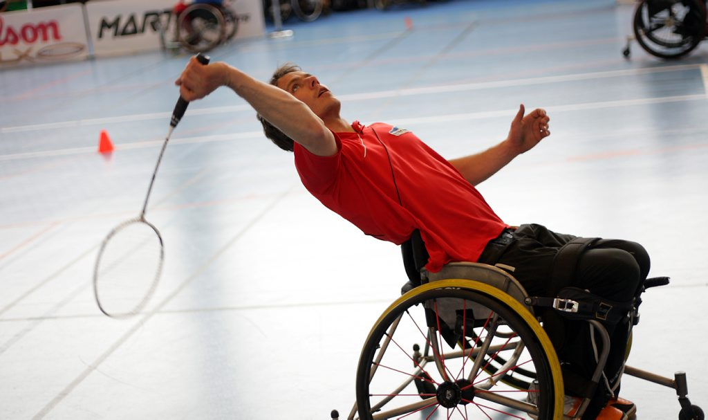 David jouant au parabdminton.